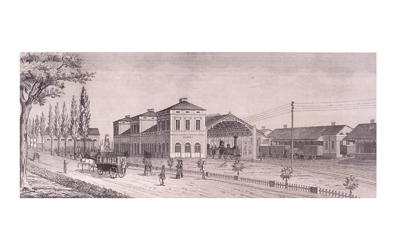 Gare de Wissembourg 1857 .Collection numérique : Images d'Alsace